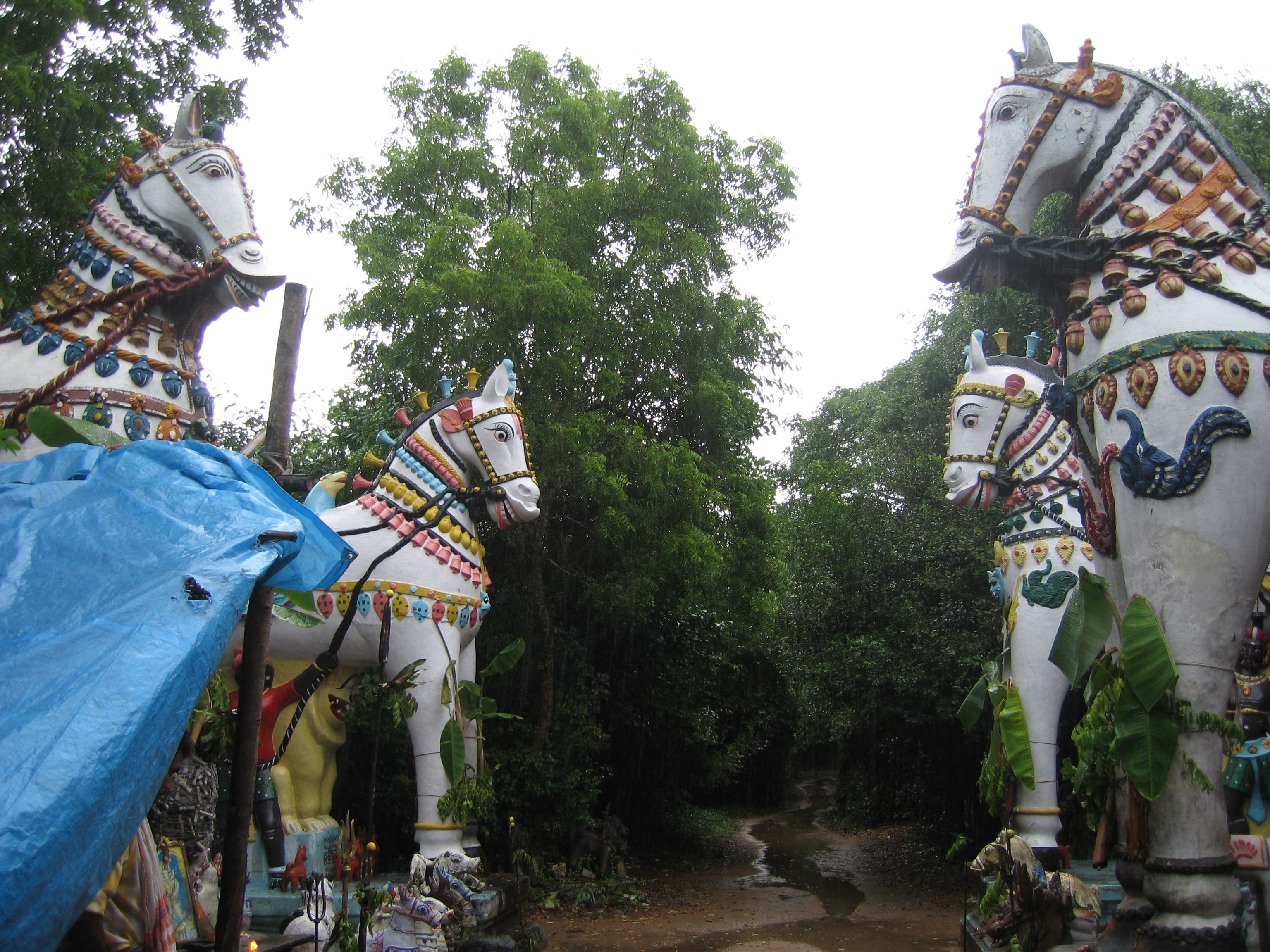 ஐயனாரின் வாகனமாக விளங்கும் குதிரைப் பரிவாரங்கள் கனத்த கம்பீரத்தோடு காட்சியளிக்கும் படம். புதுவை கீழ்ப்புத்துப்பட்டு ஸ்ரீமஞ்சனீஸ்வர ஐயனார் சுவாமி கோயில் பரிவாரங்களே இவையாம்.